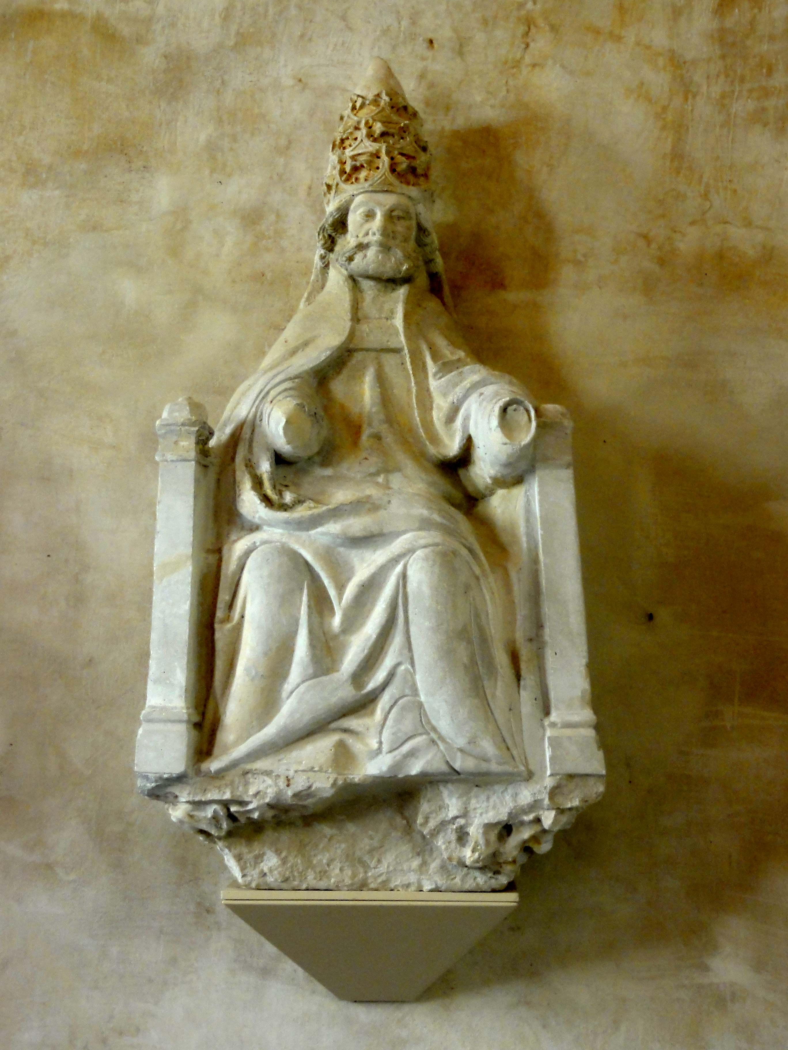 Statue de saint Pierre.